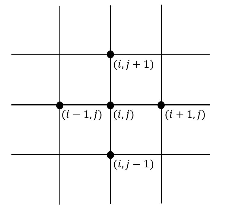 격자점과 각 점에 해당하는 상대 좌표를 보여준다.